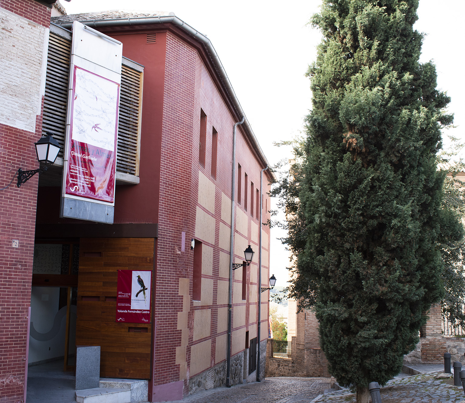 Fasade des centro Cultural